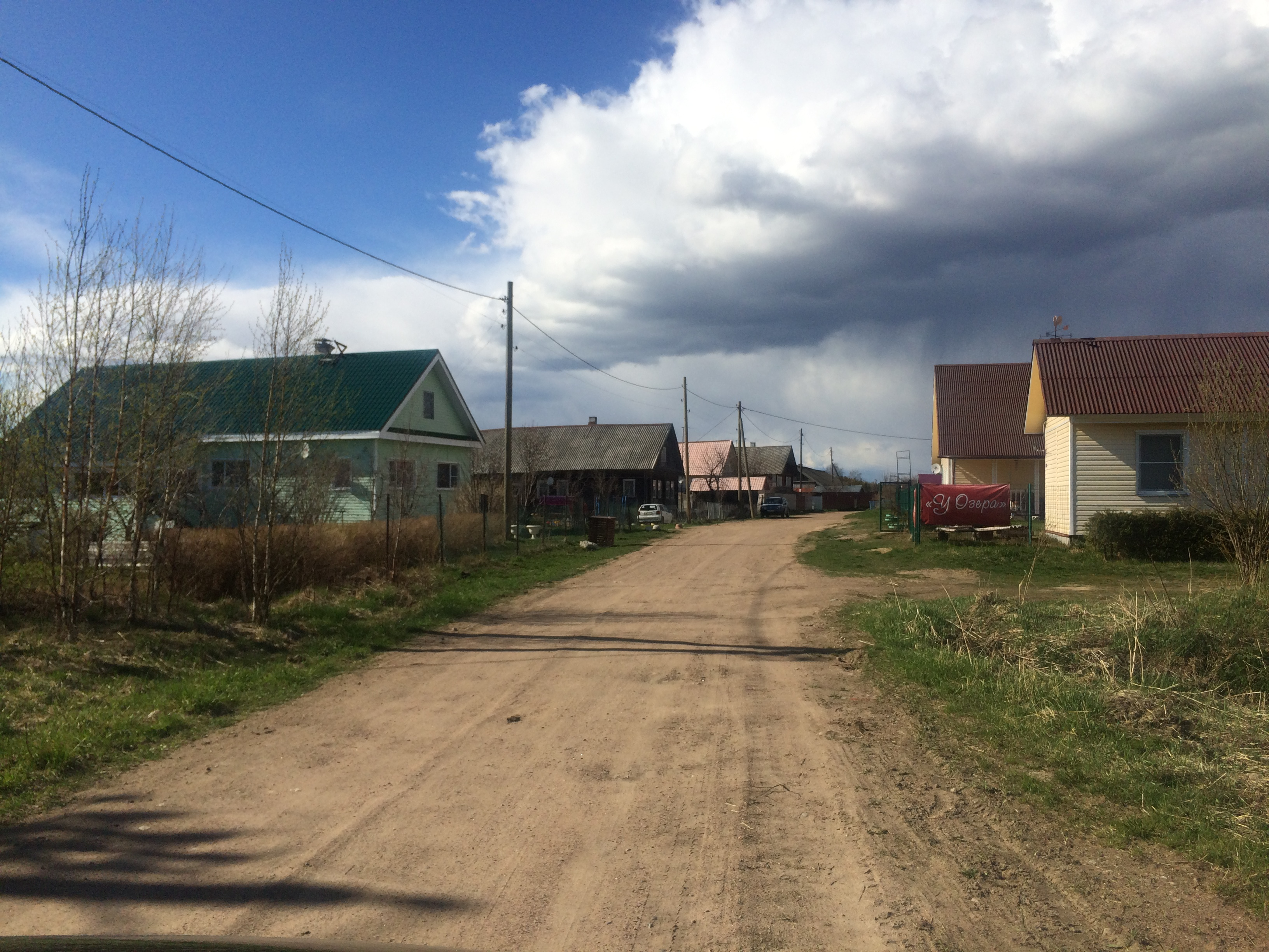 п. Лемозеро